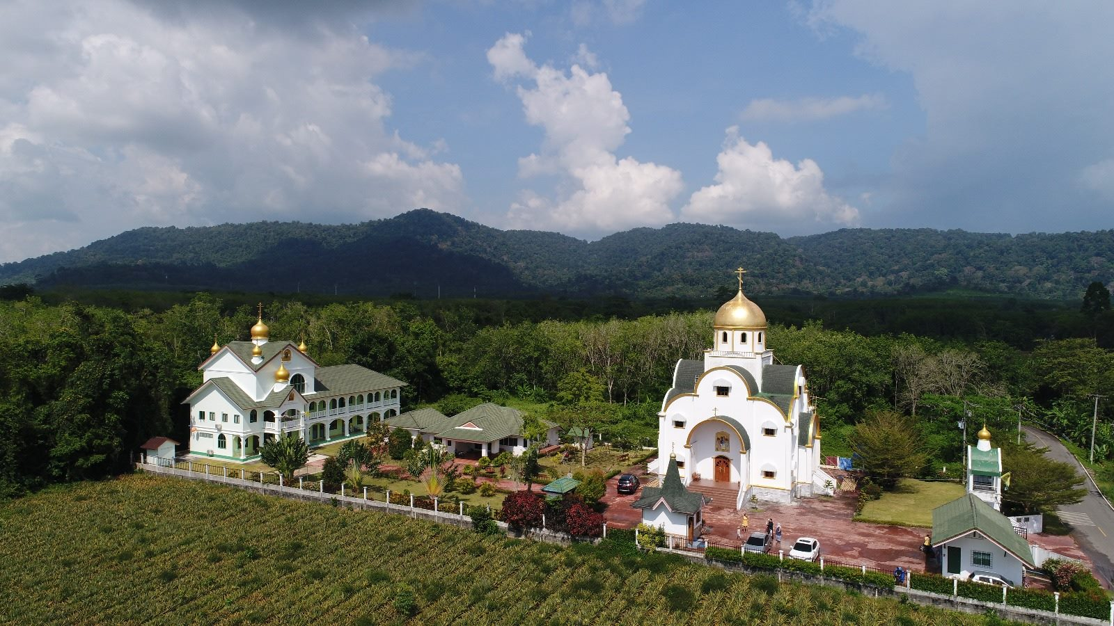 วิทยาลัยศาสนศาสตร์คริสเตียนออร์ทอดอกซ์ (ซ้าย) โบสถ์พระตรีเอกภาพ (ขวา)